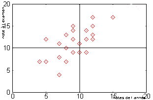 Nuage de points. Image personnelle créée avec gnuplot et gimp. Domaine public